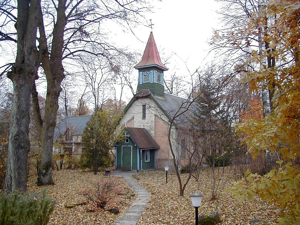 Rīga, Mežaparka luterāņu baznīca 2002-11-03